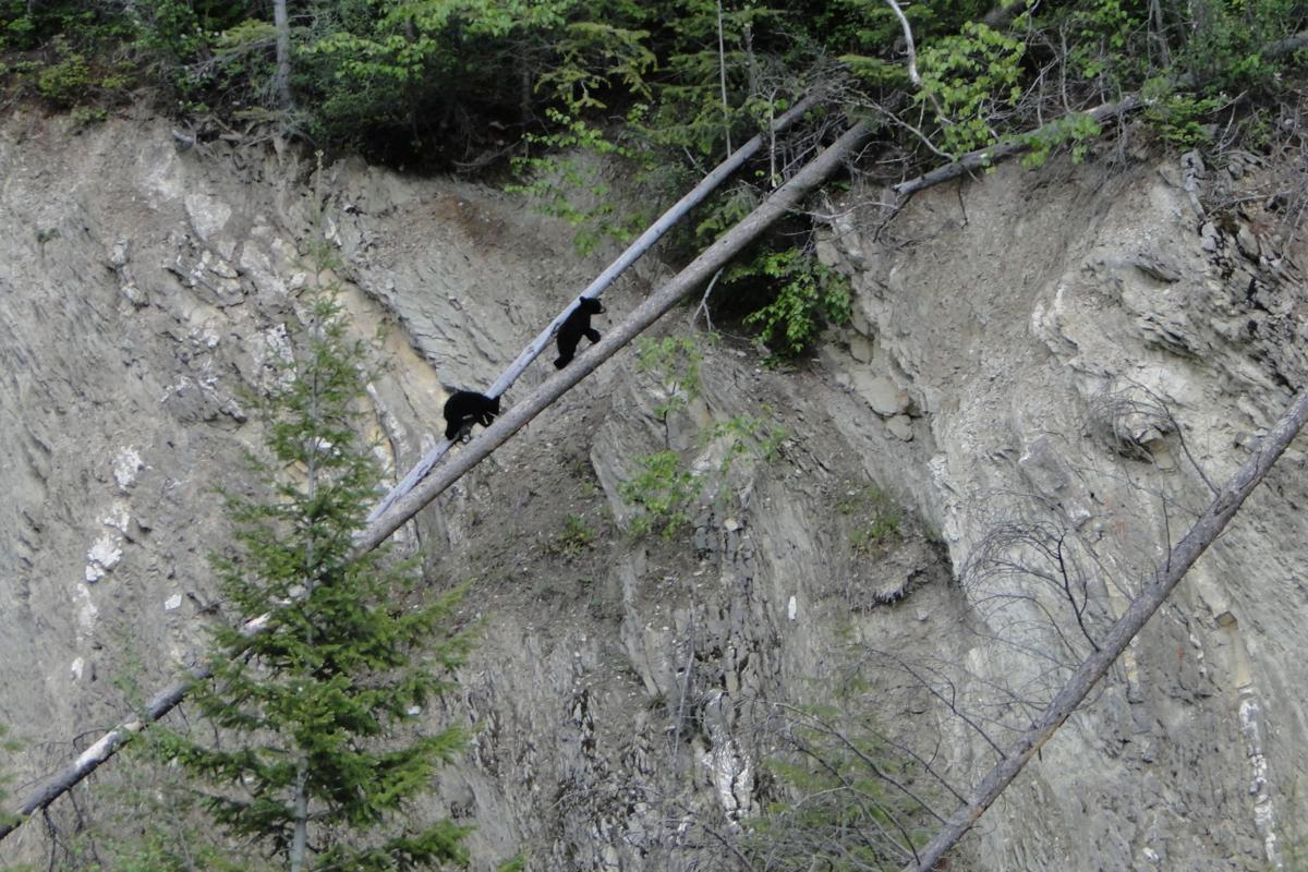 Медвежата в национальном парке Кутеней, Канада